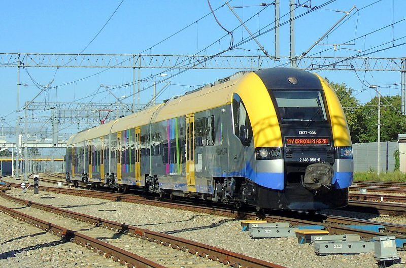 Elektryczny zespół trakcyjny EN77-005 w nowych barwach województwa małopolskiego wraca jako pociąg służbowy po naprawie poziomu P4 przeprowadzonej w ZNTK Mińsk Mazowiecki do szopy Kolei Małopolskich w Krakowie Płaszowie.